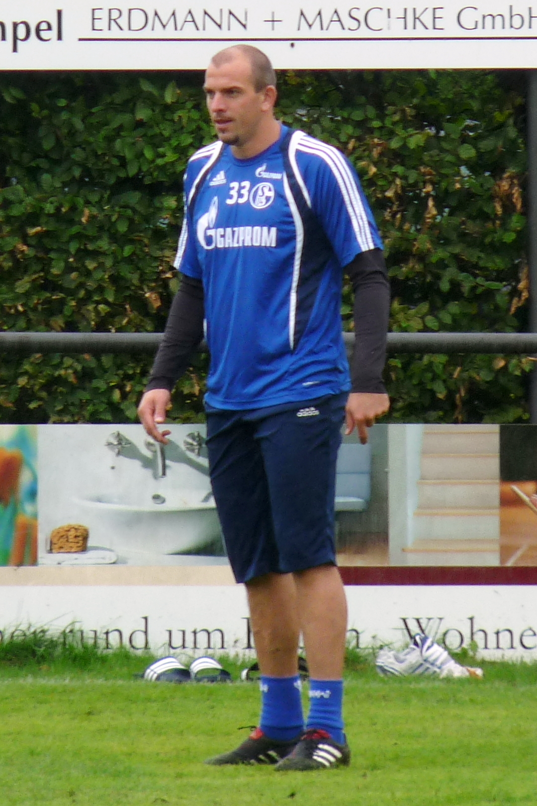 Mathias Schober während einer Trainingseinheit